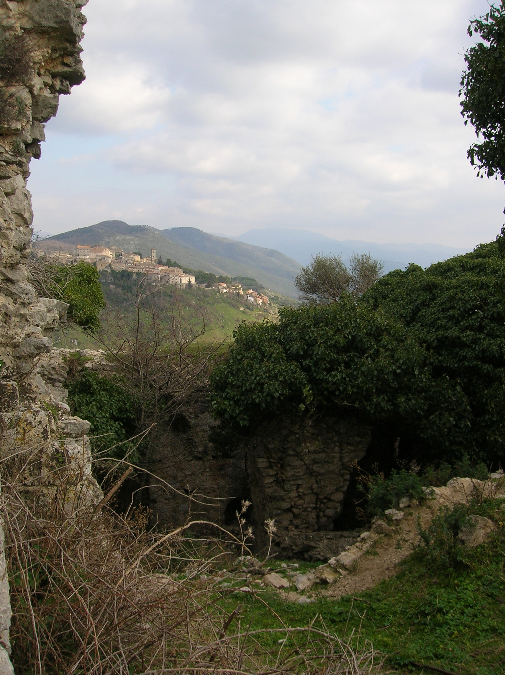 Ruderi di San Martino (Fara in Sabina)